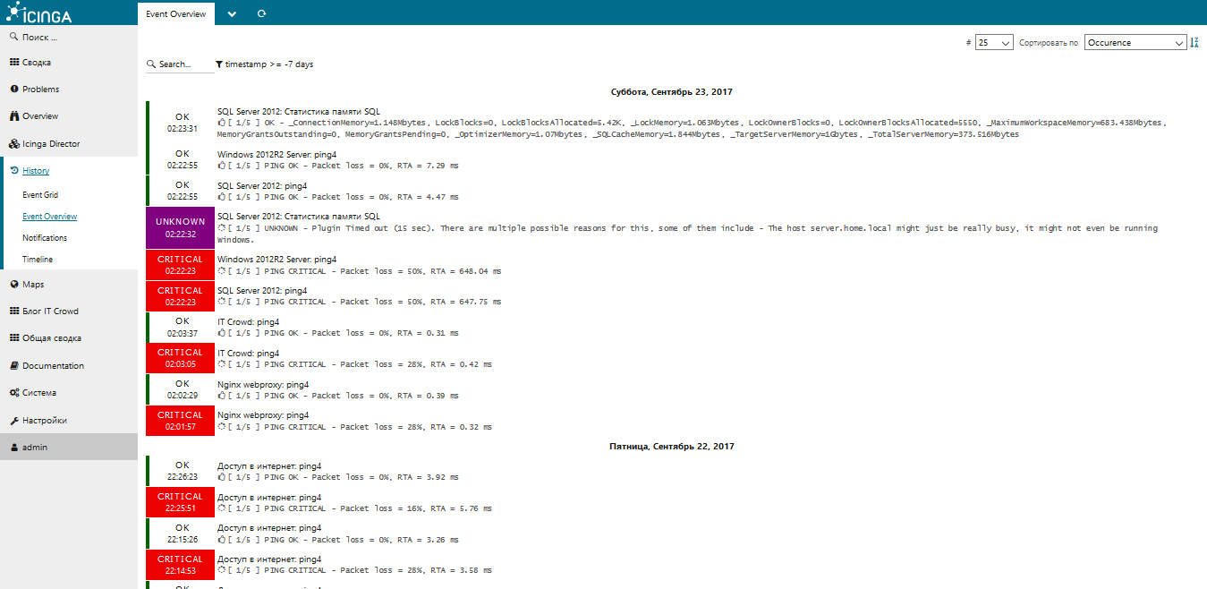 Icinga2 обзор событий